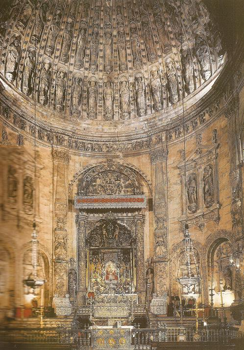 Vista general de la Capilla Real de la catedral de Sevilla. En ella se encuentran sepultados el rey Fernando III de Castilla, su esposa la reina Beatriz de Suabia, y el hijo de ambos, Alfonso X el Sabio. En la cripta de la Capilla reposan los restos del rey Pedro I de Castilla, de su esposa María de Padilla y del hijo de Pedro I, Juan de Castilla, así como los restos de Fadrique Alfonso de Castilla, que fue hijo ilegítimo de Alfonso XI de Castilla y maestre de la Orden de Santiago.